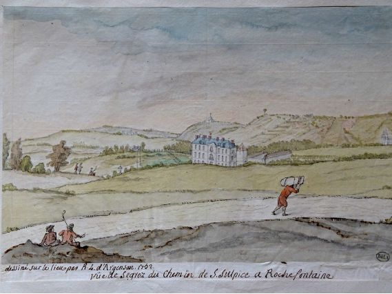 aquarelle du marquis d4argenson ancien ministre des affaires étrangères de Louis XV représentant le château de Segrez